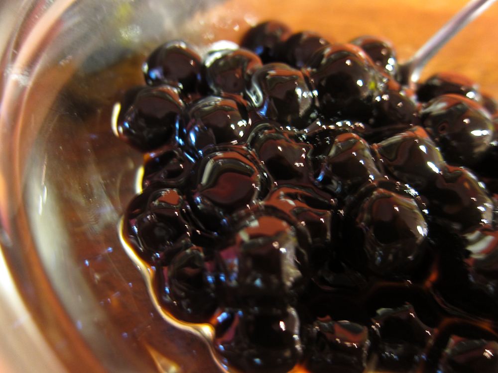 tapioca balls